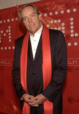 Powers Boothe en mars 2005.